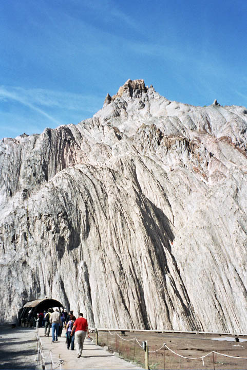 Entrada a la mina